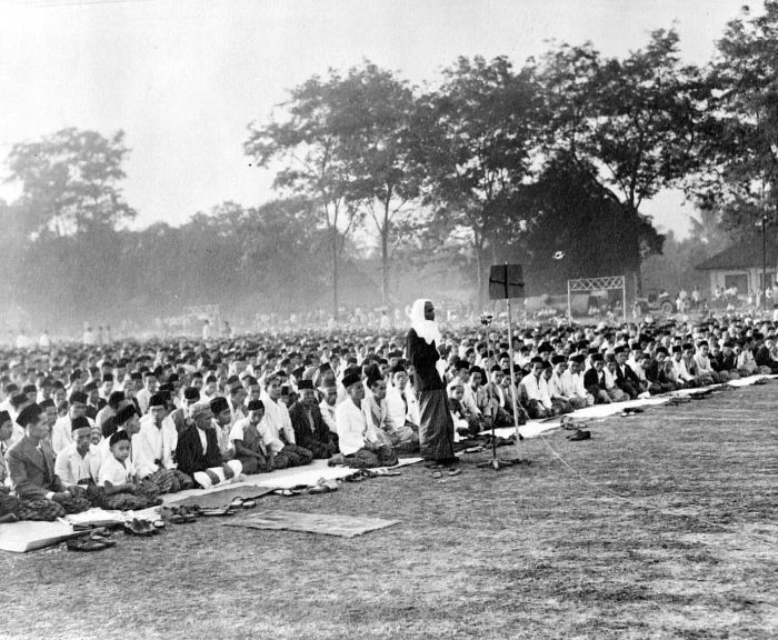 Repronegatief. Leberan-viering te Makassar. Massale Takbir-plechtigheid op een van de pleinen, geleid door hadji Mochtar Luthfi.